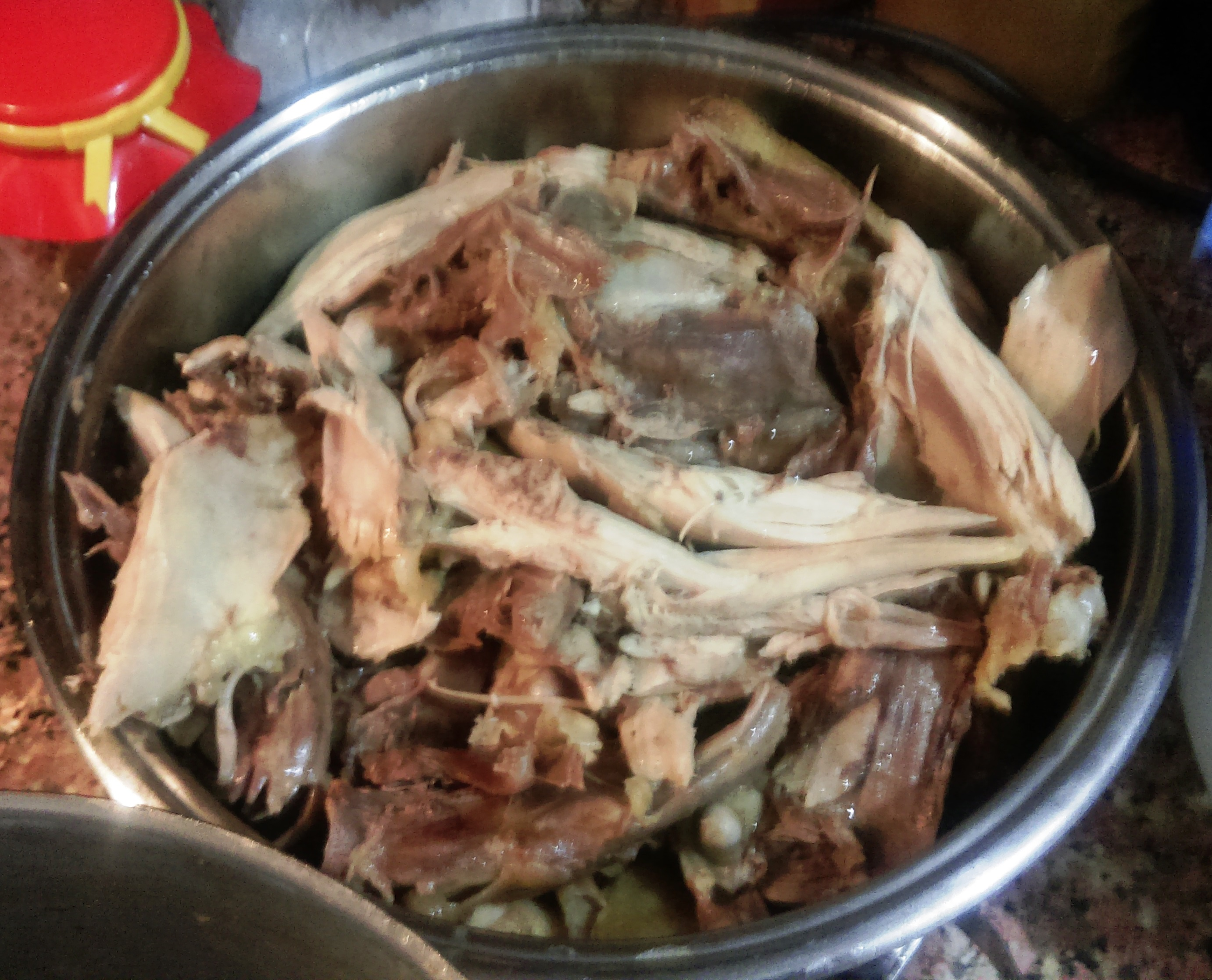 Parçalara ayrılmış haşlanmış tavuk eti.